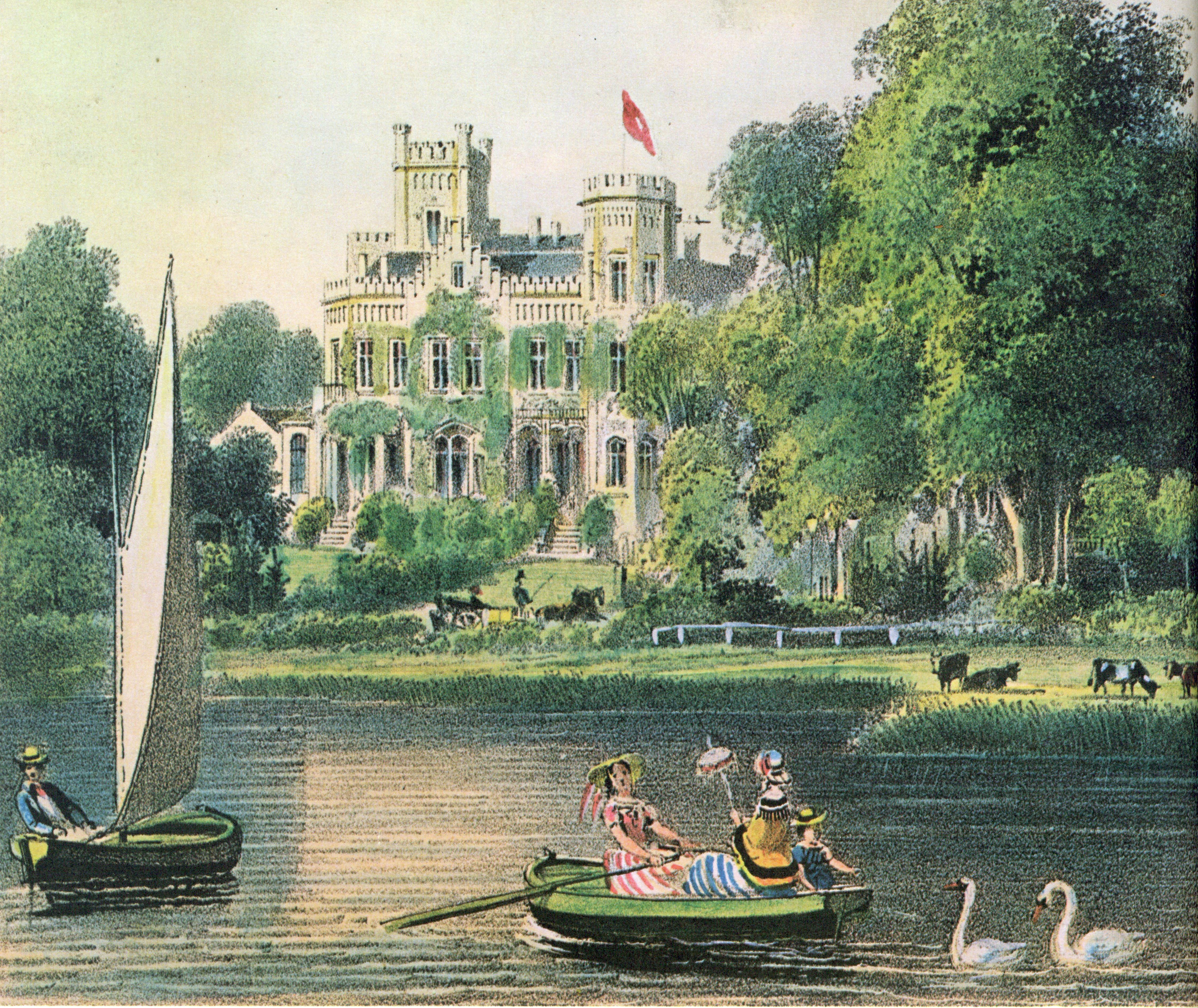 Wilhelm Heuer Lithographie: Harvestehuder Weg Hamburg Slomanburg Bootsfahrt auf der Alster